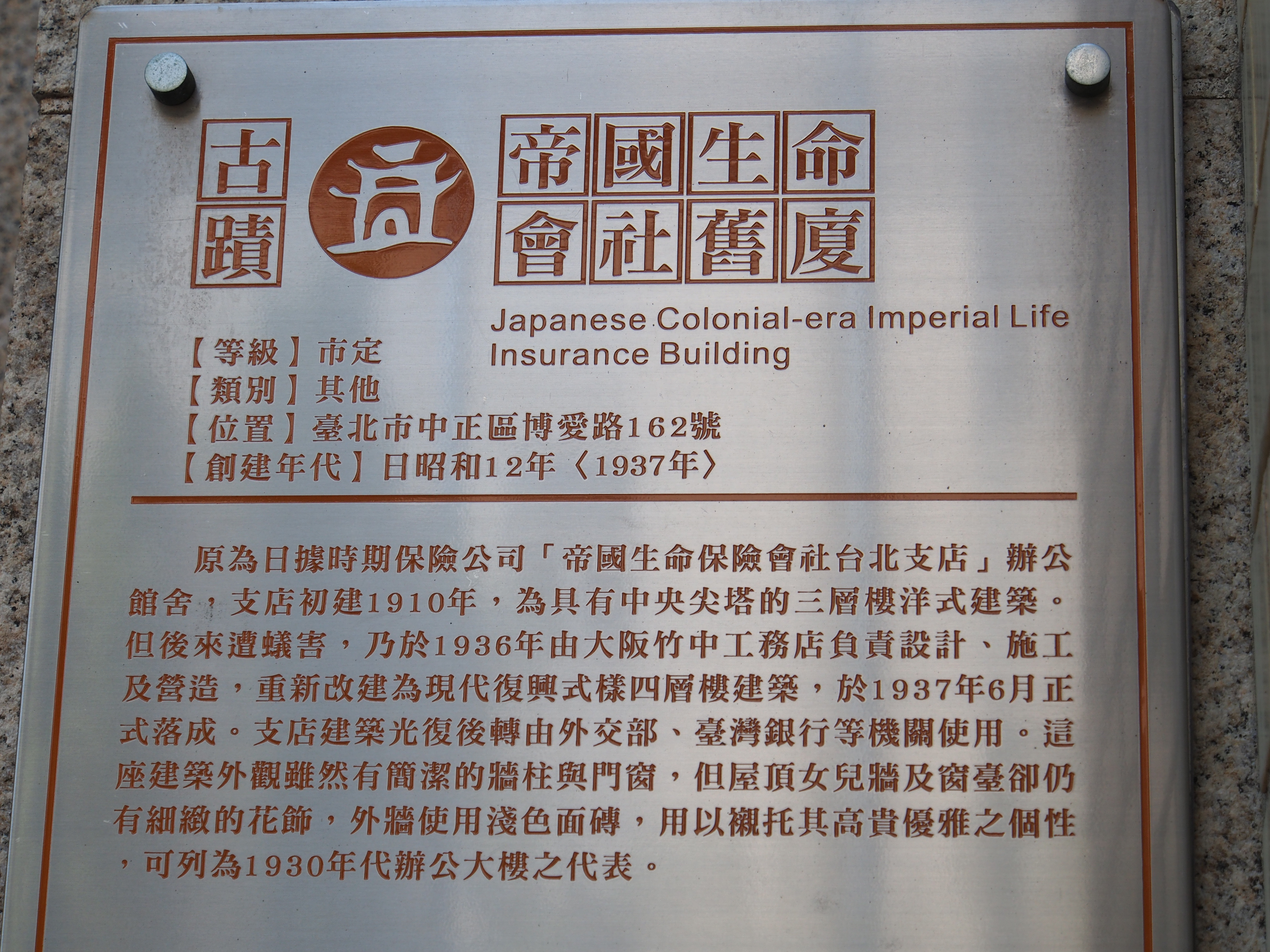 臺北市博愛路帝國生命會社舊廈解說牌。